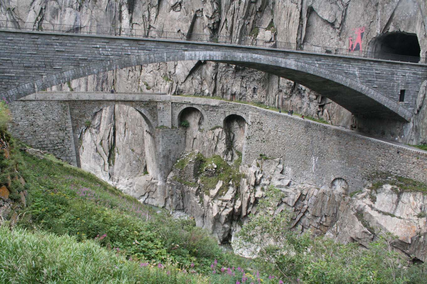 zweite und dritte Teufelsbrücke in der Schöllenenschlucht